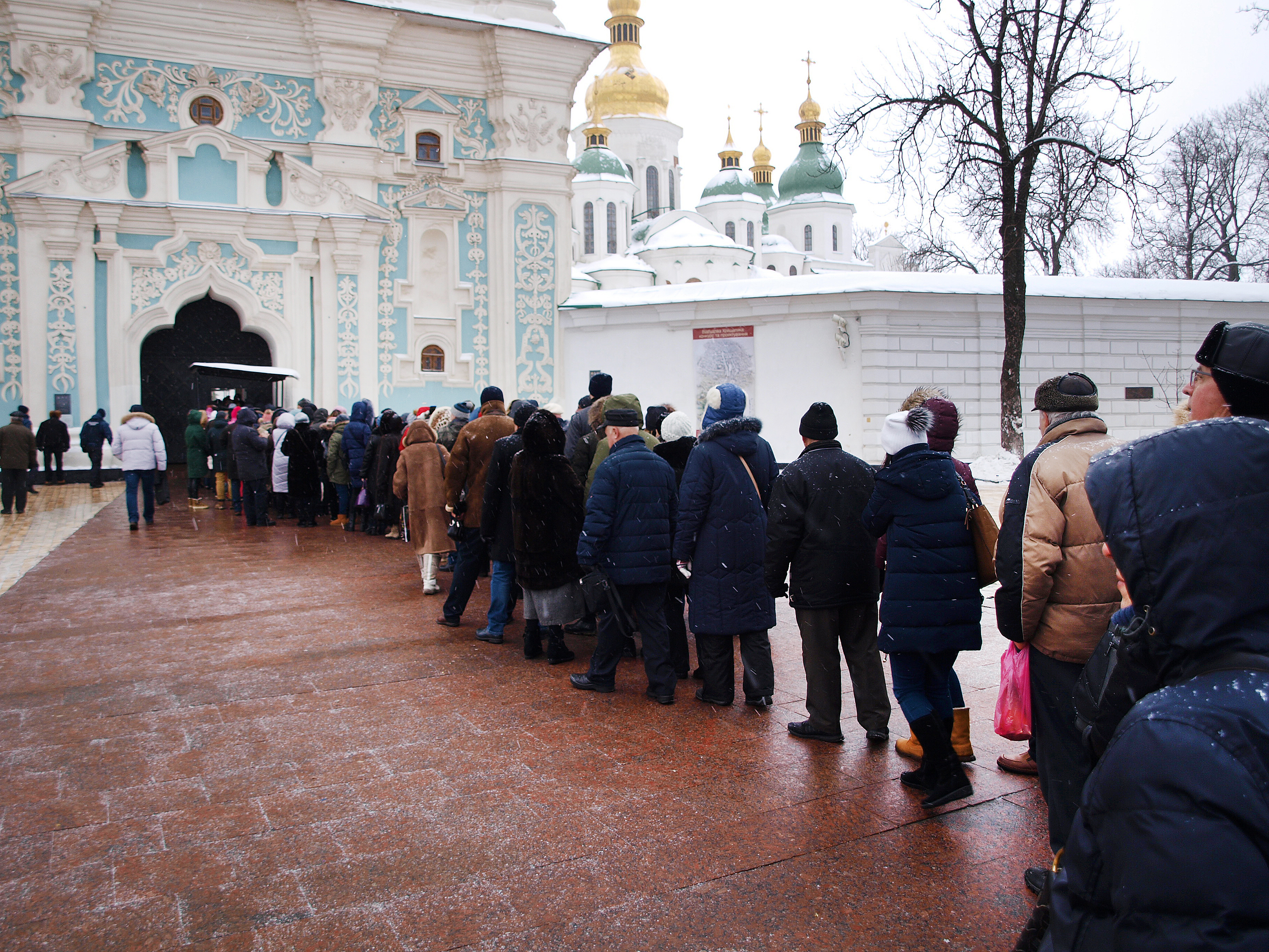 Черга вірян, охочих оглянути Томос. Софійський майдан, 7.01.2019